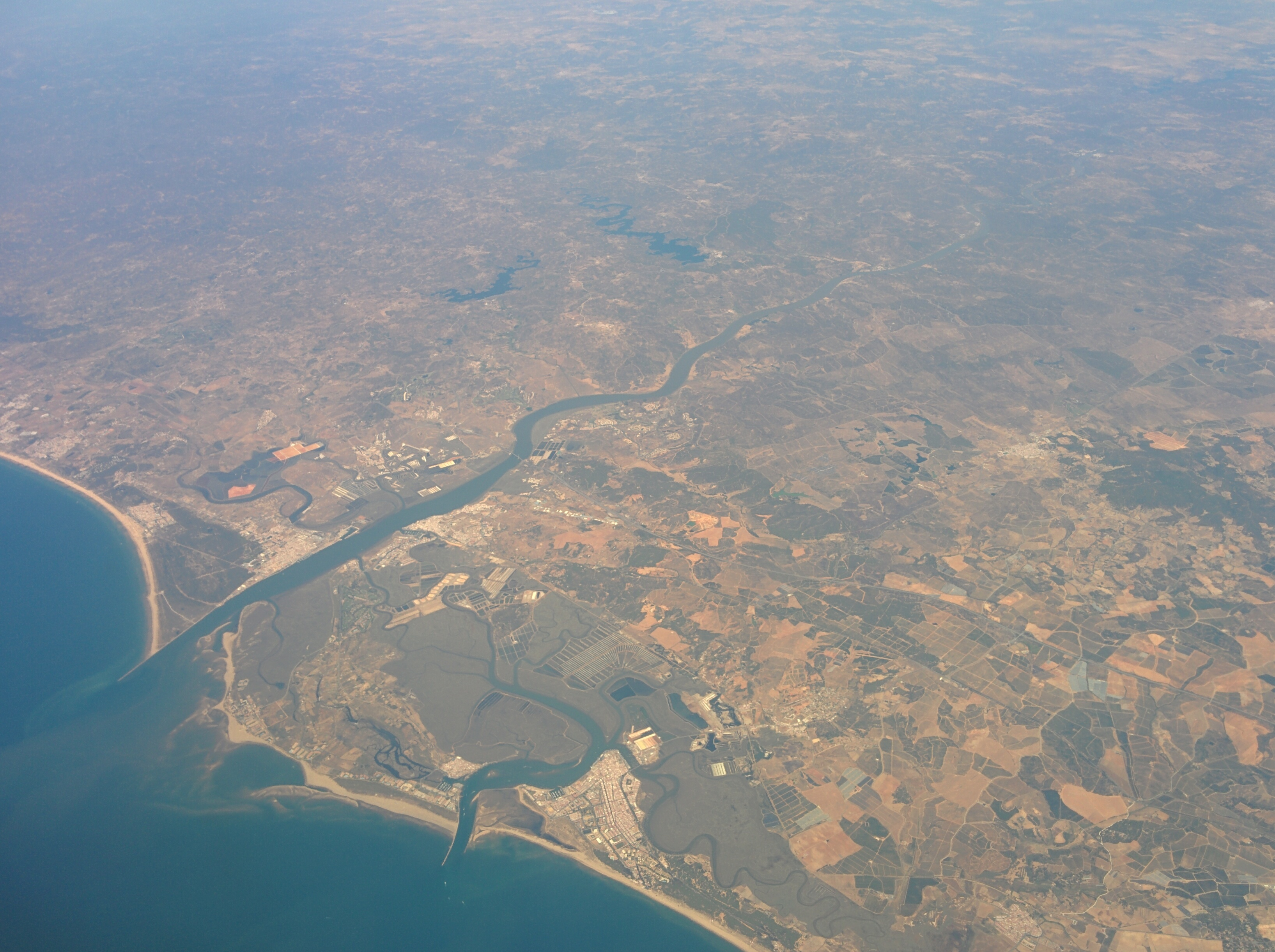 Vista aérea de la desembocadura del río Guadiana.